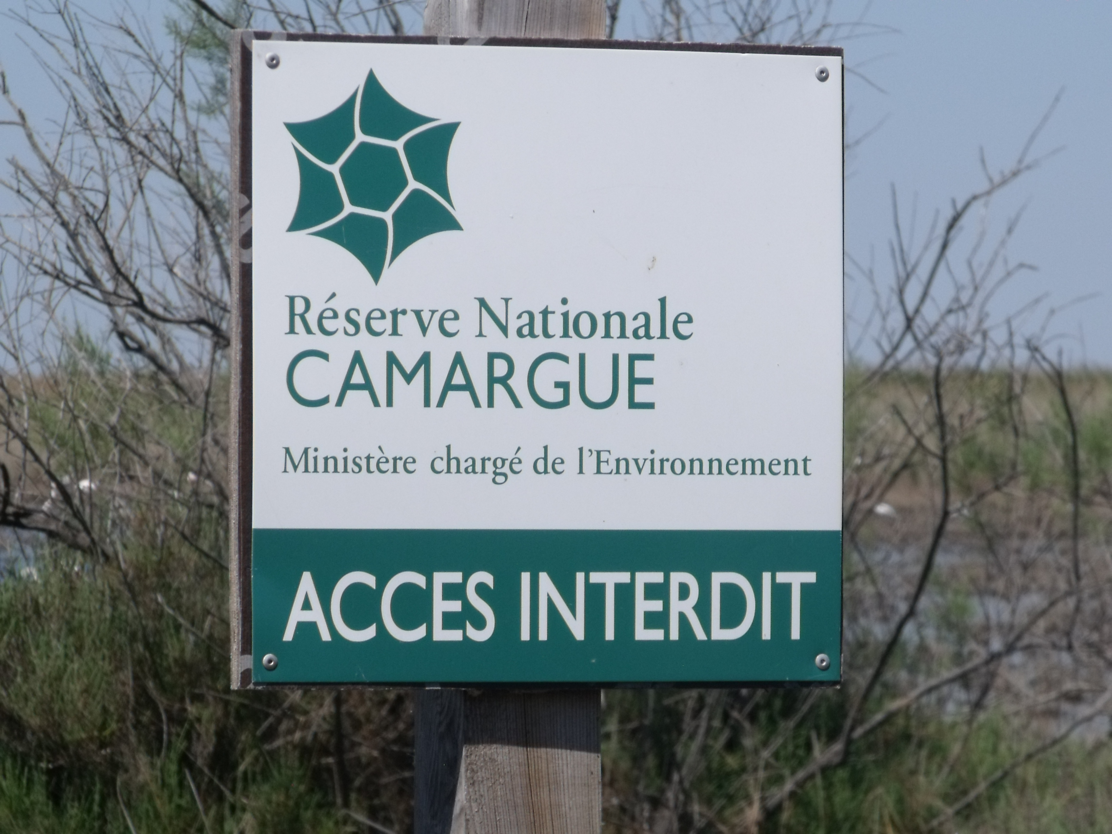 Panneau d'accès interdit à la réserve nationale de Camargue